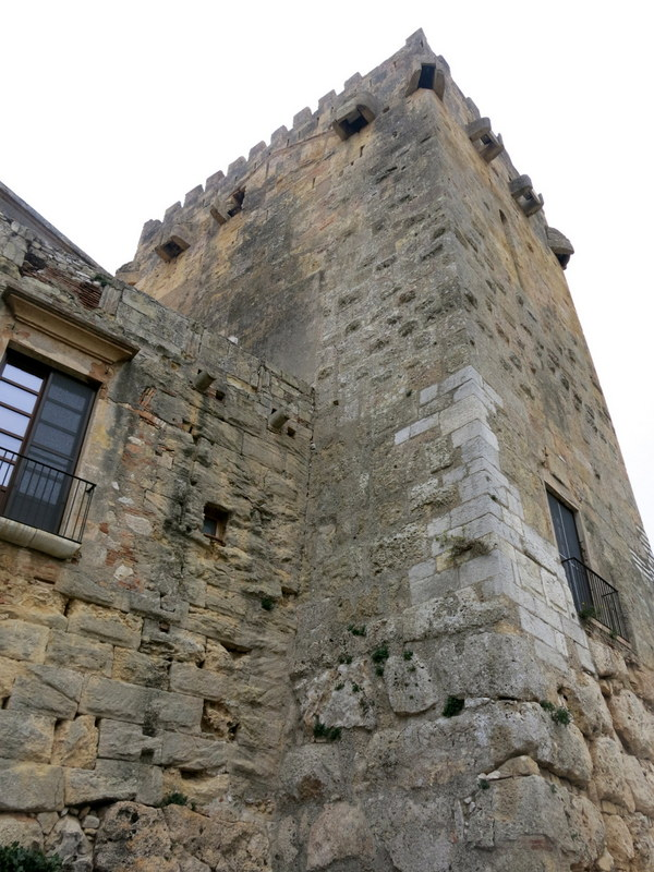 castell de Paborde a Tarragona